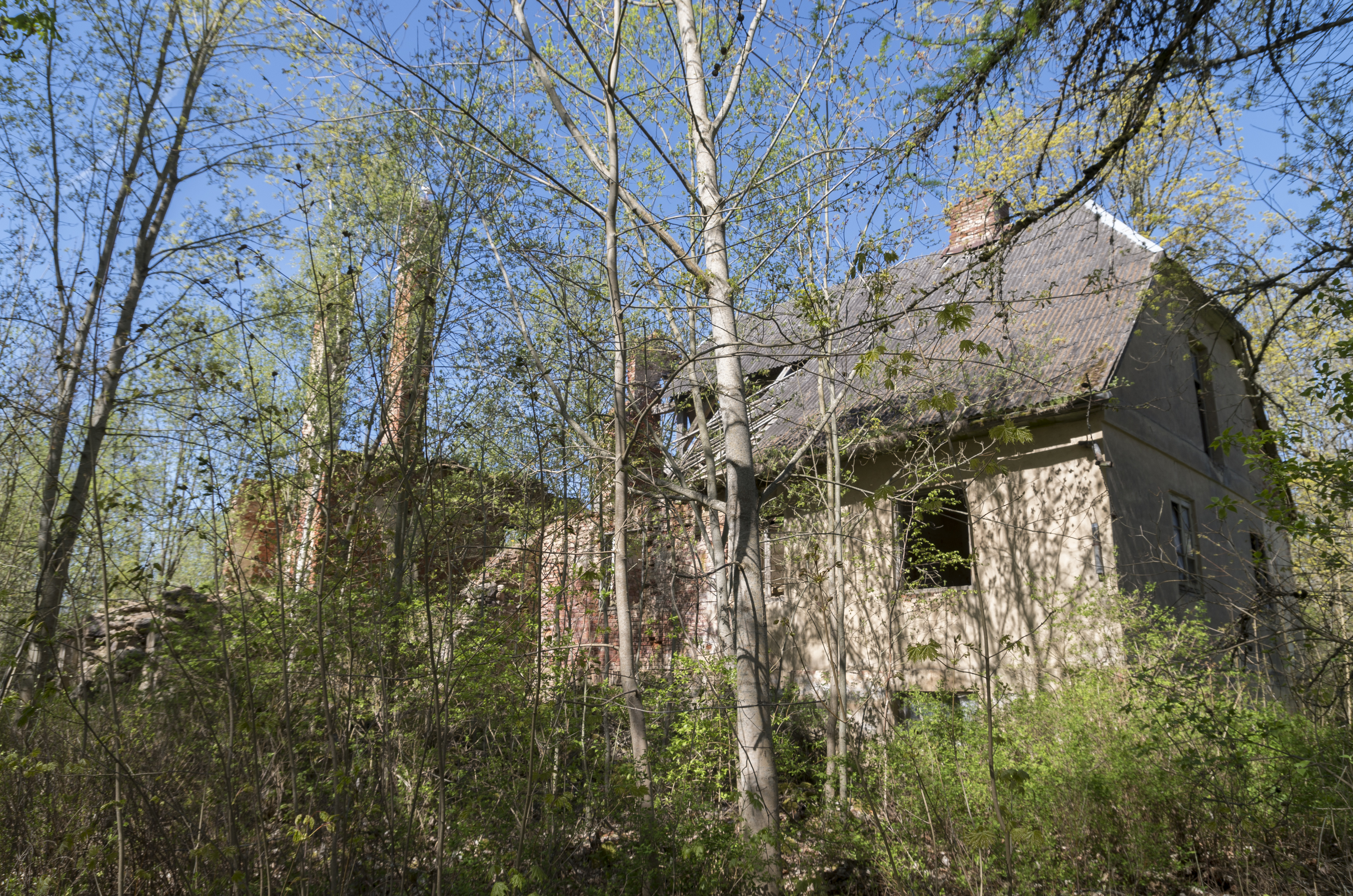 Zutēnu muižas drupas, 09.05.2015.